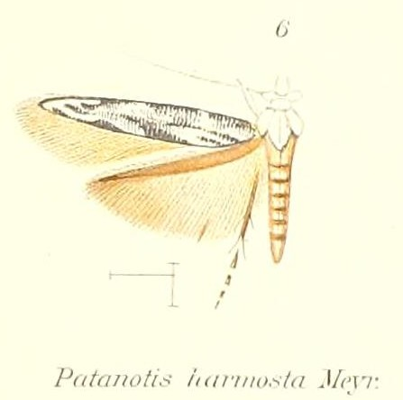 Patanotis harmosta